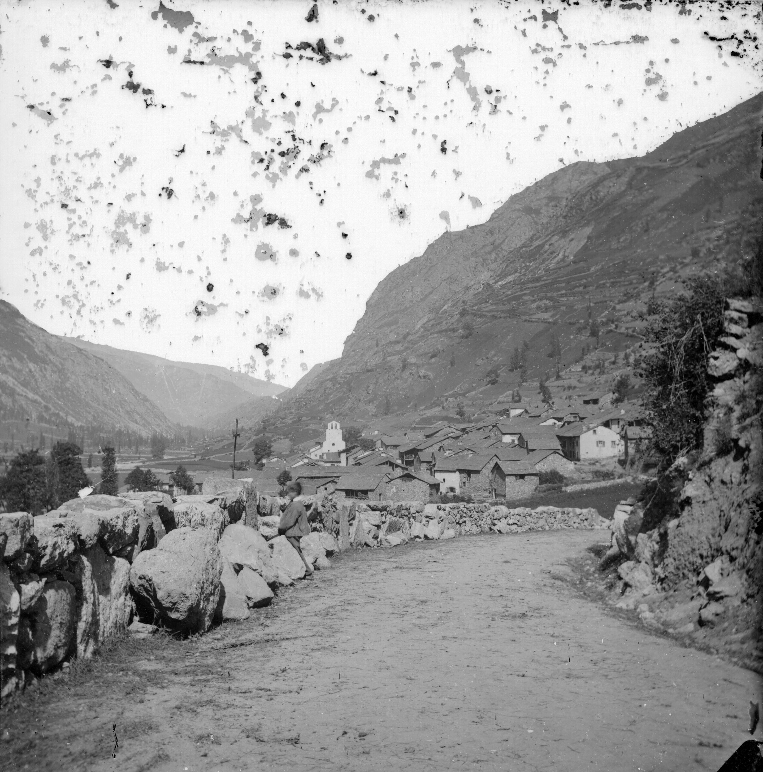 Fonds Trutat - Photographie ancienne Cote : TRU C 444 Localisation : Fonds ancien Original non communicable Titre : Orlu, le village, Ariège Auteur : Trutat, Eugène Rôle de l’auteur : Photographe Lieu de création : Orlu (Ariège) Date de création : : 19e siècle, 4e quart Mesures : 9 x 9 cm Observations : Plaque pîquée Mot(s)-clé(s) : -- Montagne -- Village -- Maison -- Route -- Parapet -- Végétation -- Orlu (Ariège) -- Ax-les-Thermes (Ariège ; canton) -- Orlu (Ariège ; vallée) -- Pyrénées (France) -- 19e siècle, 2e moitié -- 20e siècle, 1e quart Médium : Photographies Médium : Positifs sur plaque de verre -- Noir et blanc -- Paysages de montagne Bibliothèque de Toulouse. Domaine public